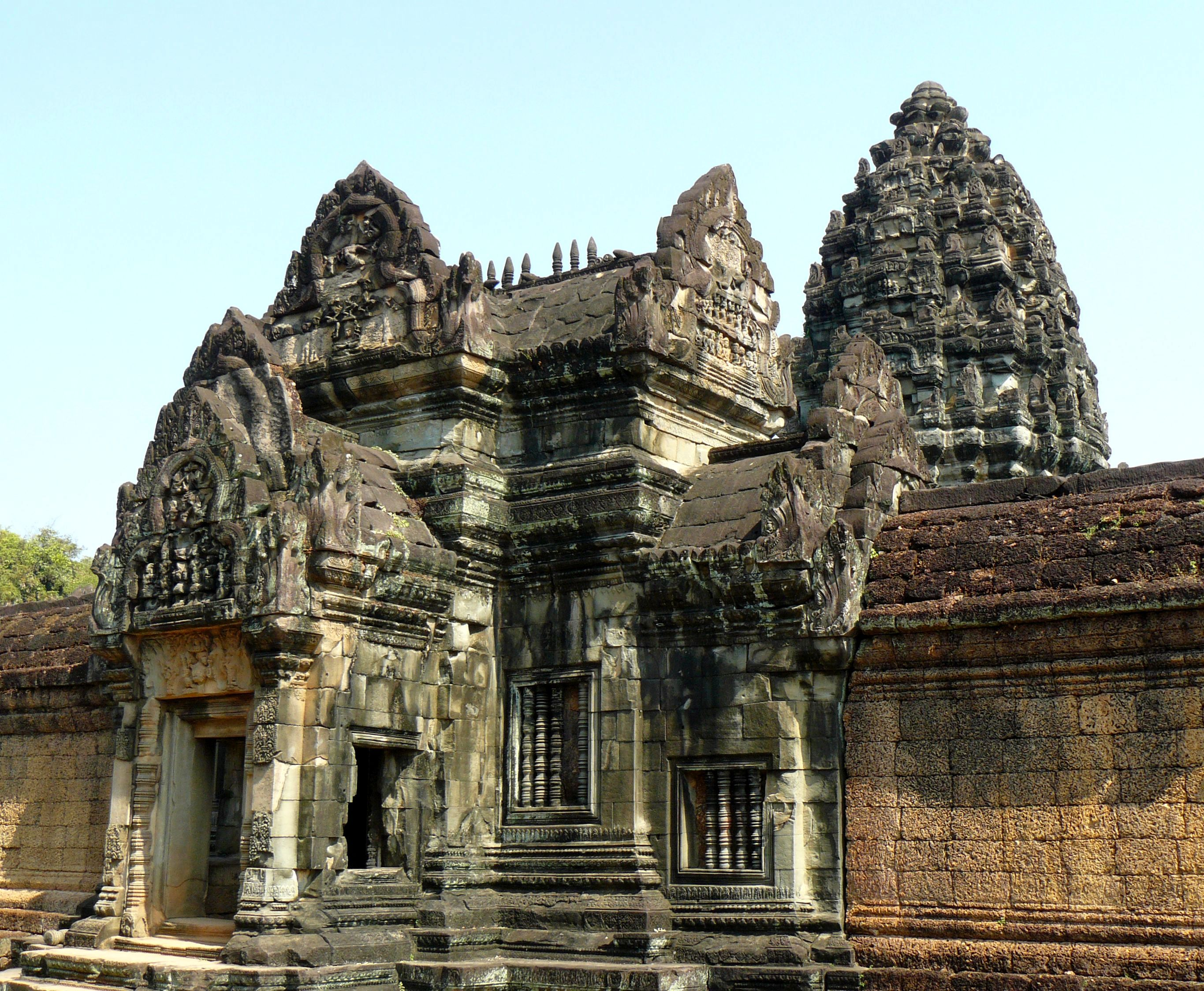 Banteay Samre, Cambodia